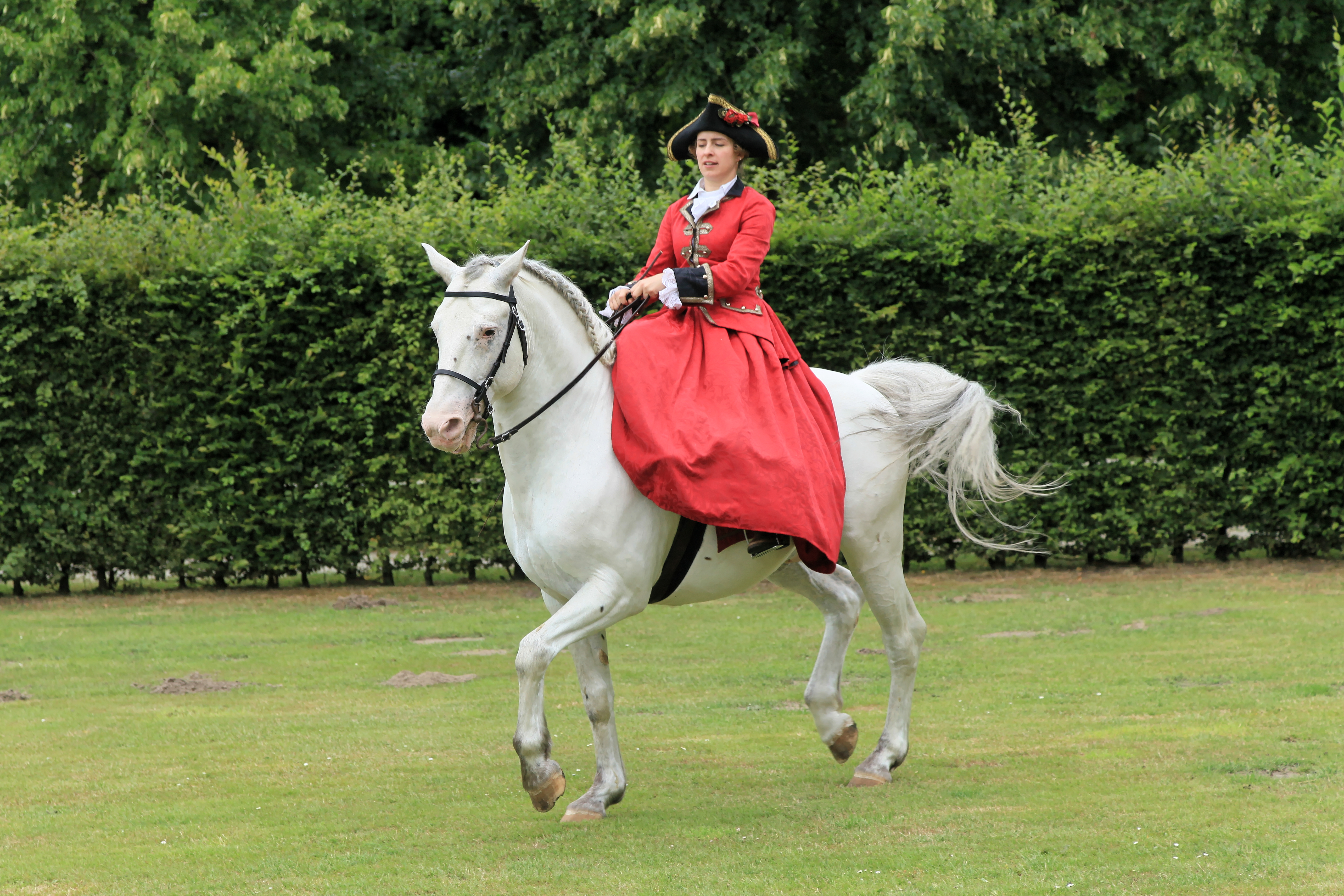 Bürgerfest in Aschendorf, Gartenfest im Stil des Rokoko im Park von Gut Altenkamp in Aschendorf, Papenburg